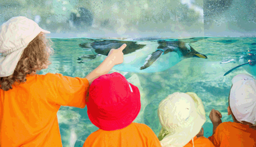 Kinder beobachten die lebhaften Eselspinguine